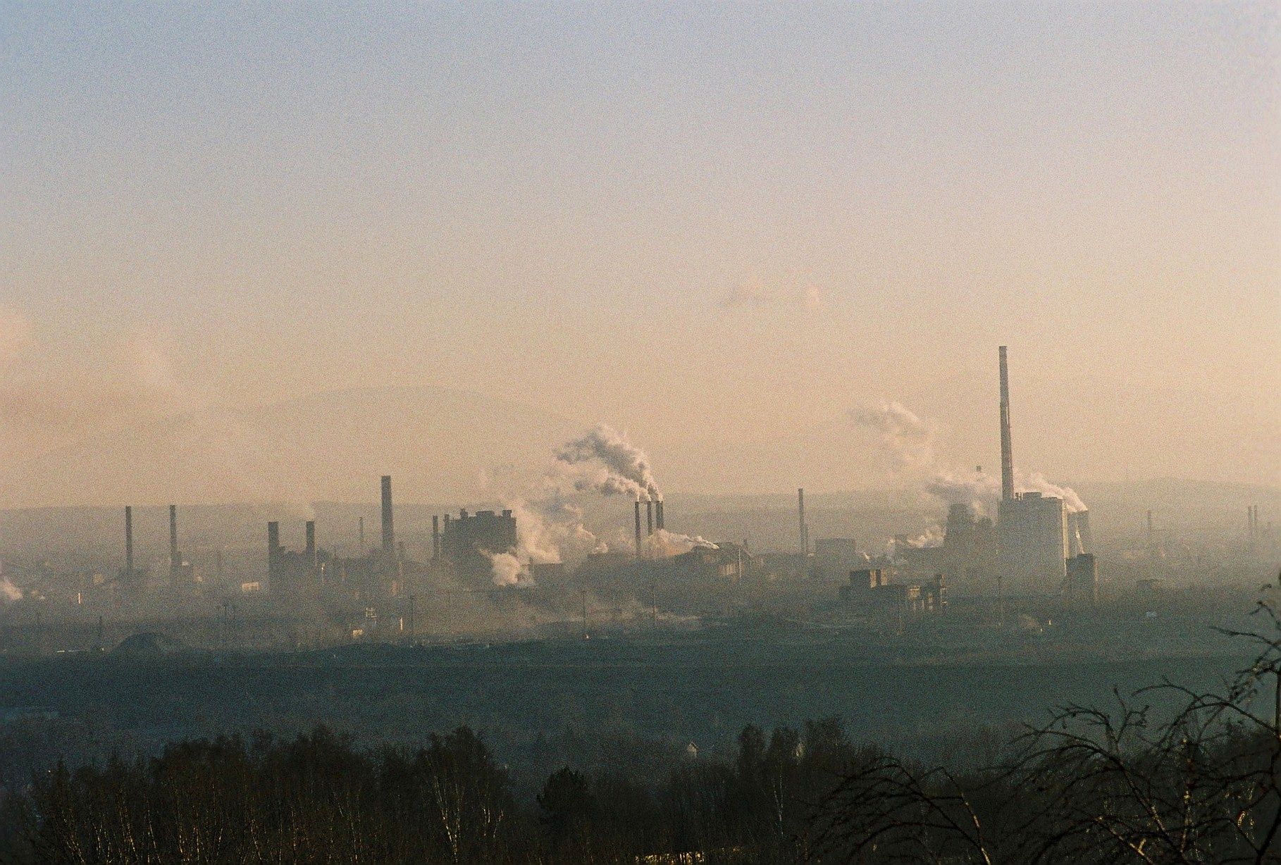 Nova hut Ostrava